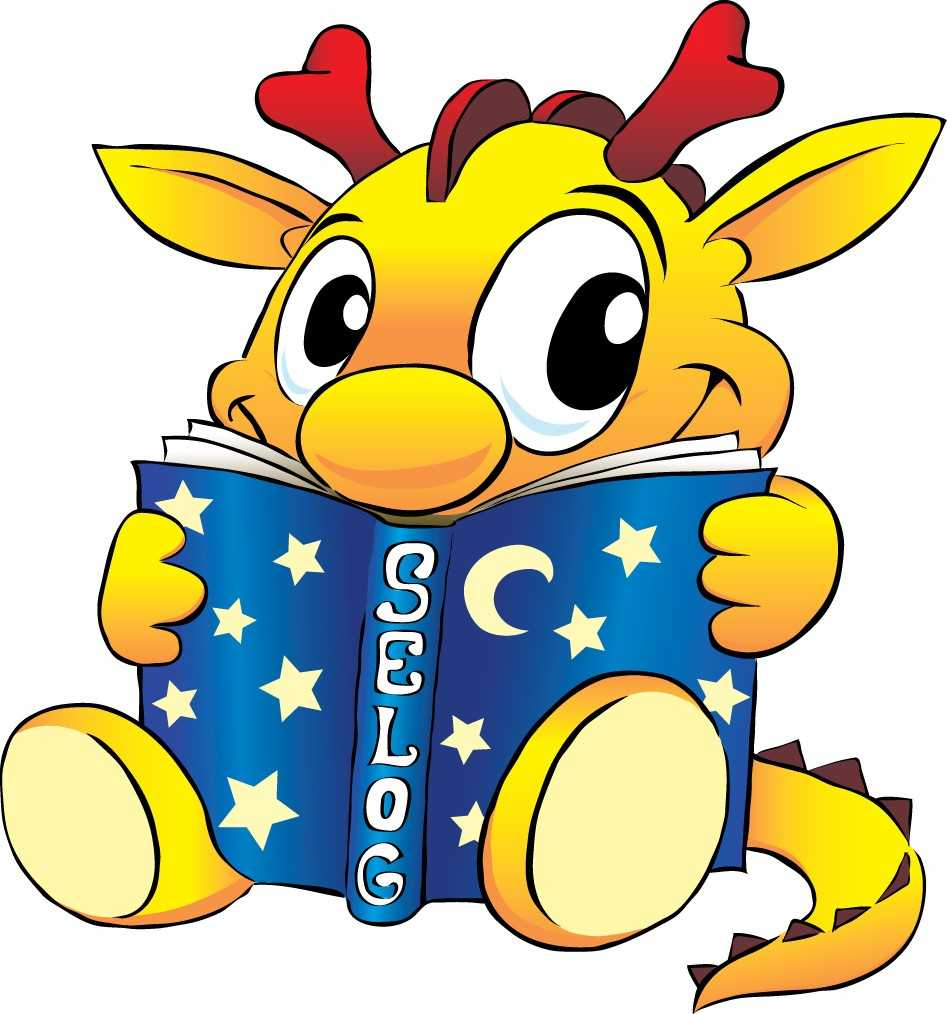 Eicon sydd yn cefnogi defnydd o'r Gymraeg. Draig felen